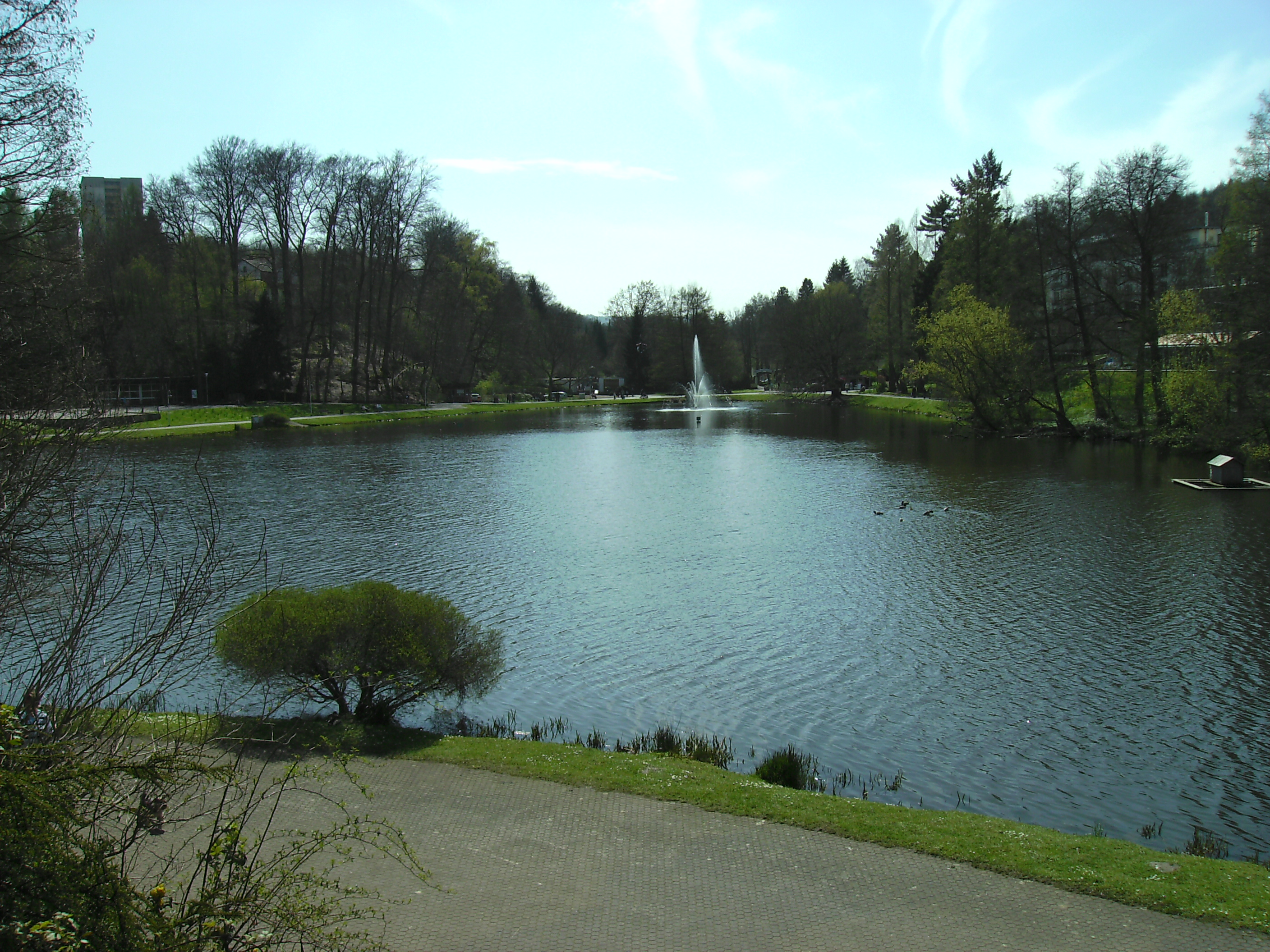 Saarbrücken: Deutsch-Französischer Garten, Deutschmühlenweiher